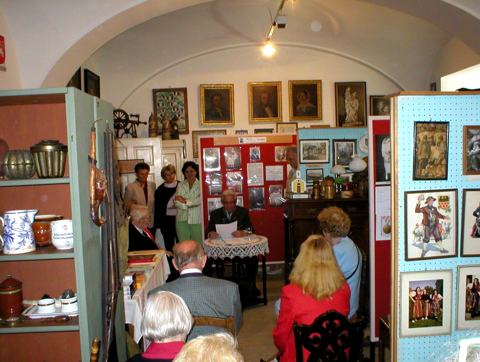 Ausstellungseröffnung Zettl